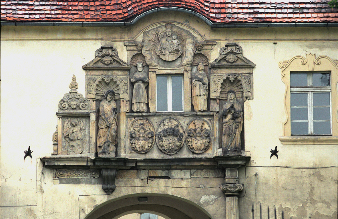 Głogówek